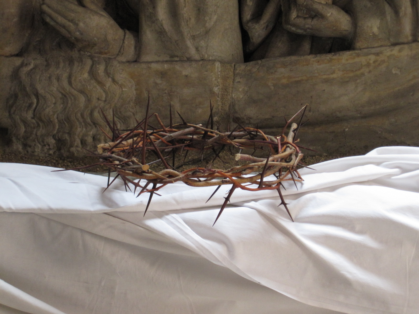 Couronne d'épine de l'église Saint-Michel de Dijon en Bourgogne